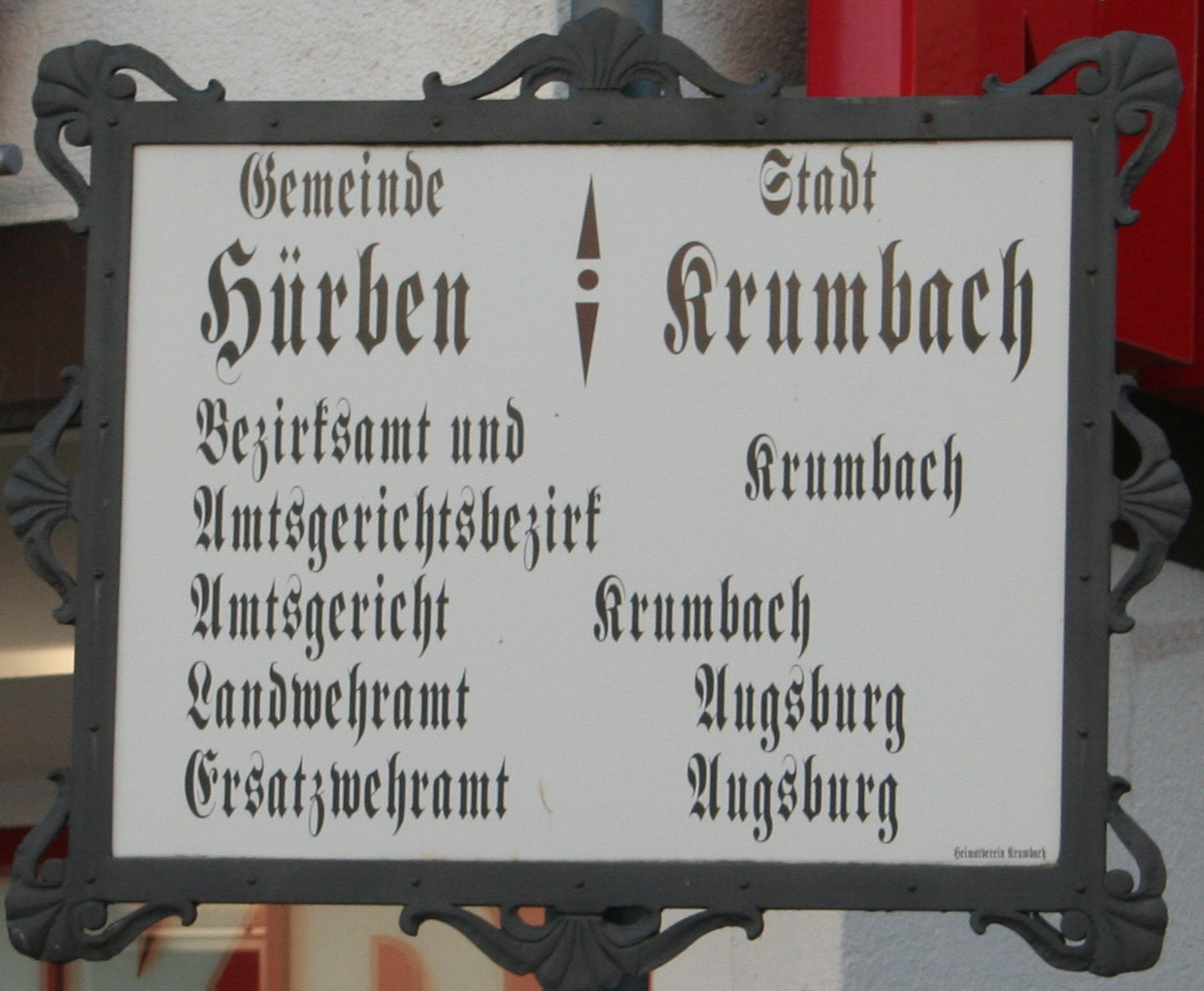 Krumbach – Karl-Mantel-Straße: Nachbildung des Schildes an der Grenze zwischen Krumbach und Hürben (steht an der originalen Stelle)